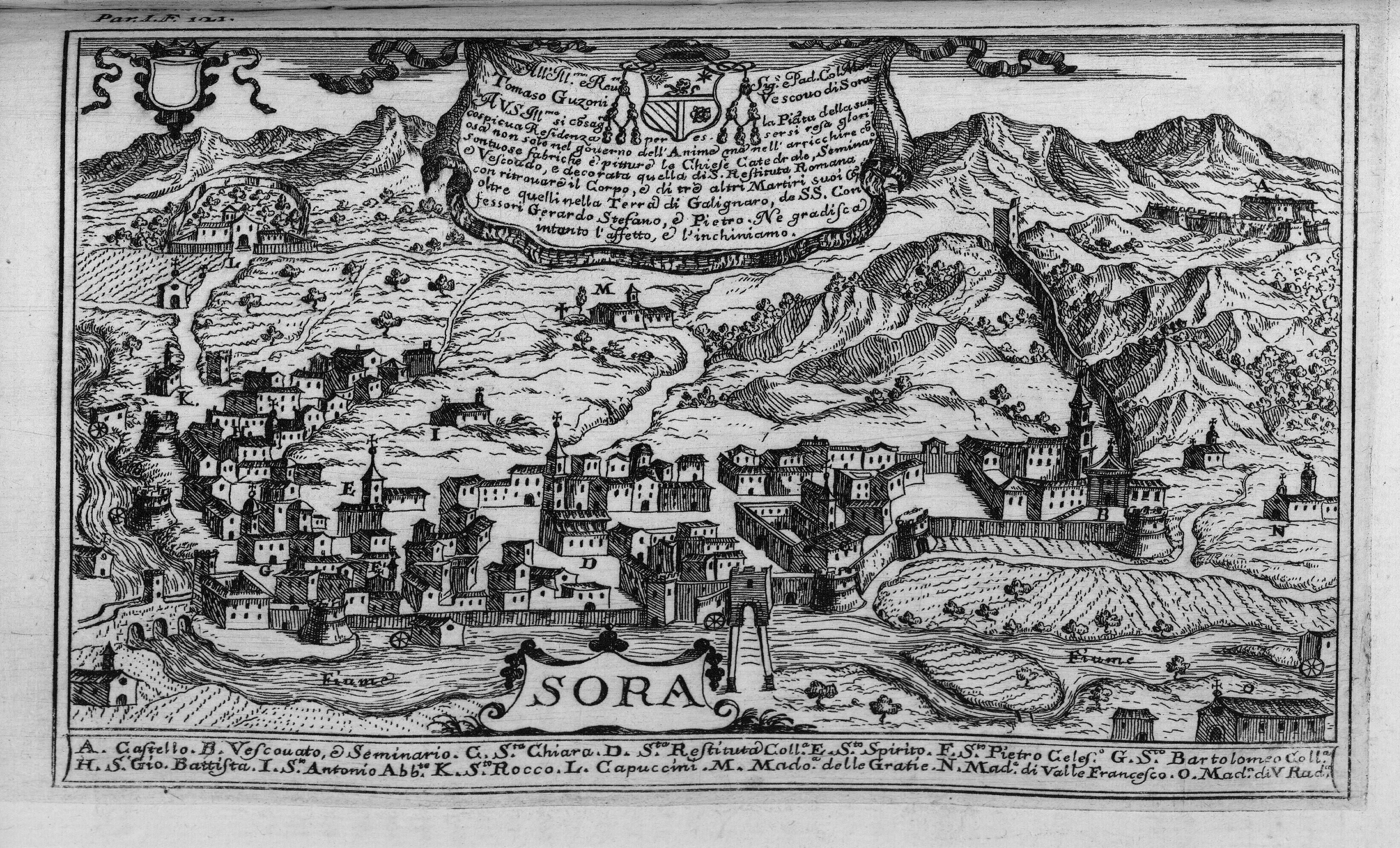 Autor: Pacichelli, Giovanni Battista, 1641-1702 Descripción bibliográfica: Il regno di Napoli in prospettiva : diviso in dodeci provincie, in cui si descrivono la sua Metropoli Fidelissima città di Napoli ... Opera postuma divisa in tre parti / dell'abatte Gio. Battista Pacichelli ; Parte prima [-terza] ... Del regno di Napoli in prospettiva / dell'abate Pacichelli. Parte prima. - In Napoli : nella Stamperia di Michele Luigi Mutio, 1703. - v. : principalmente il.; 4º . - Inic. adorn. y frisos dec. - Grab. calc. y h. pleg. grab. calc. de mapas de Cassianus de Silva. Ilustrador: Cassiano De Silva, Francesco, il. Impresor: Muzio, Michele Luigi, imp. Lugar de impresión: Italia. Nápoles Localización: Vea la ilustración en su contexto